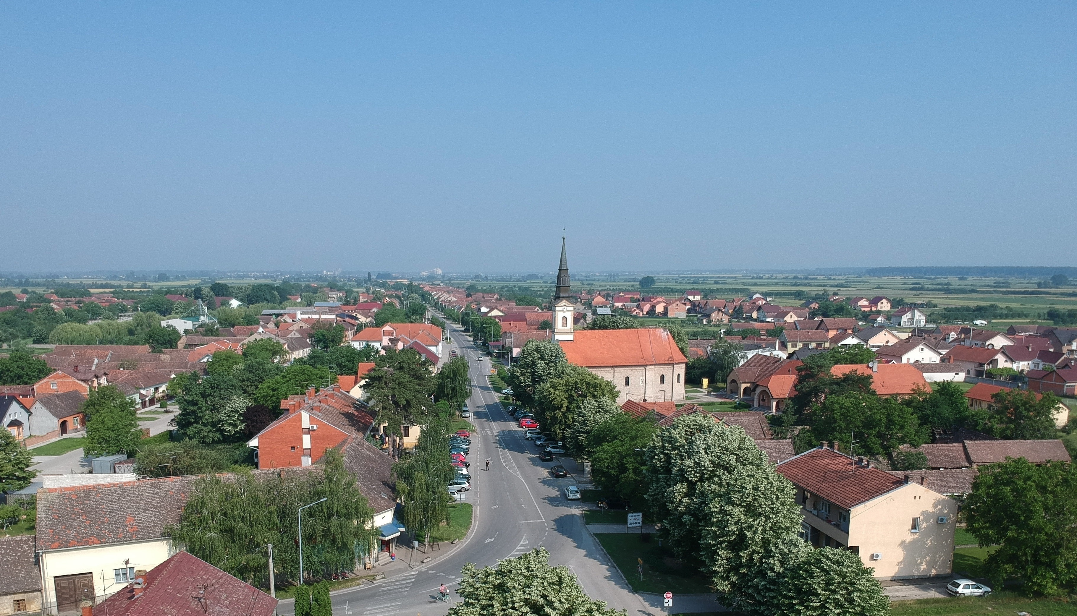 Središte Bošnjaka